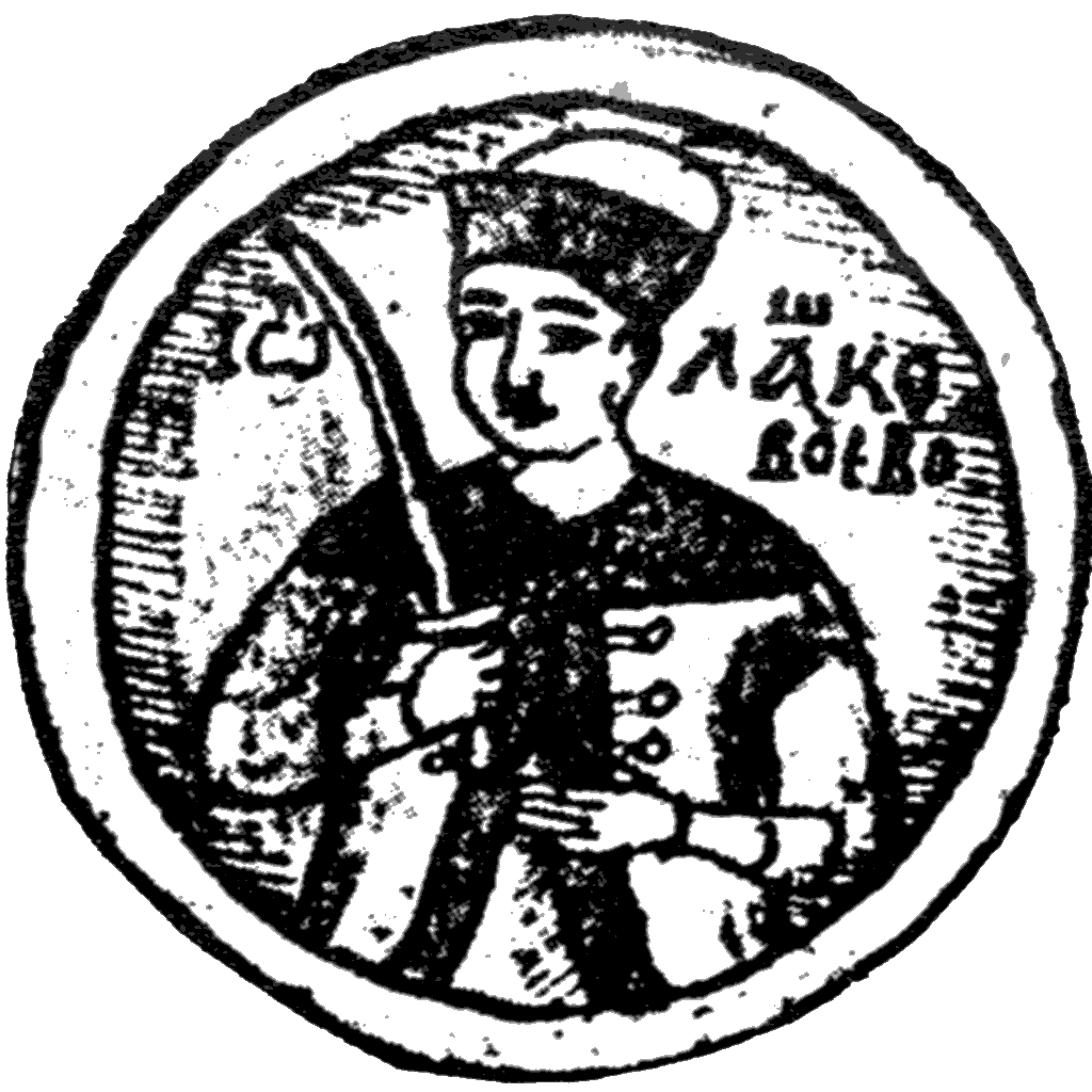 Laţcu, voievodul Moldovei. Miniatură de pe un manuscris din secolul al XVII-lea.